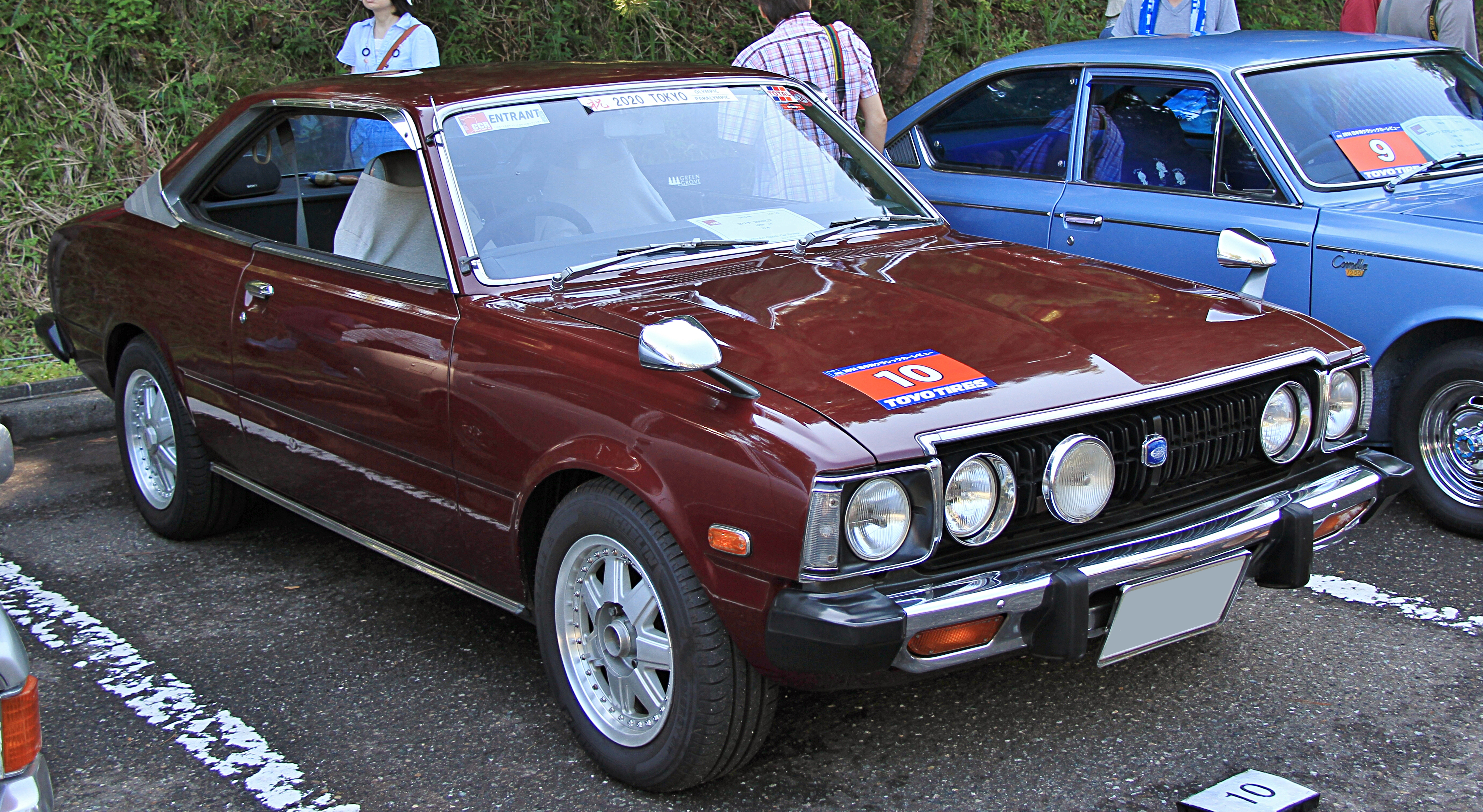 Toyota Corona 2000GT